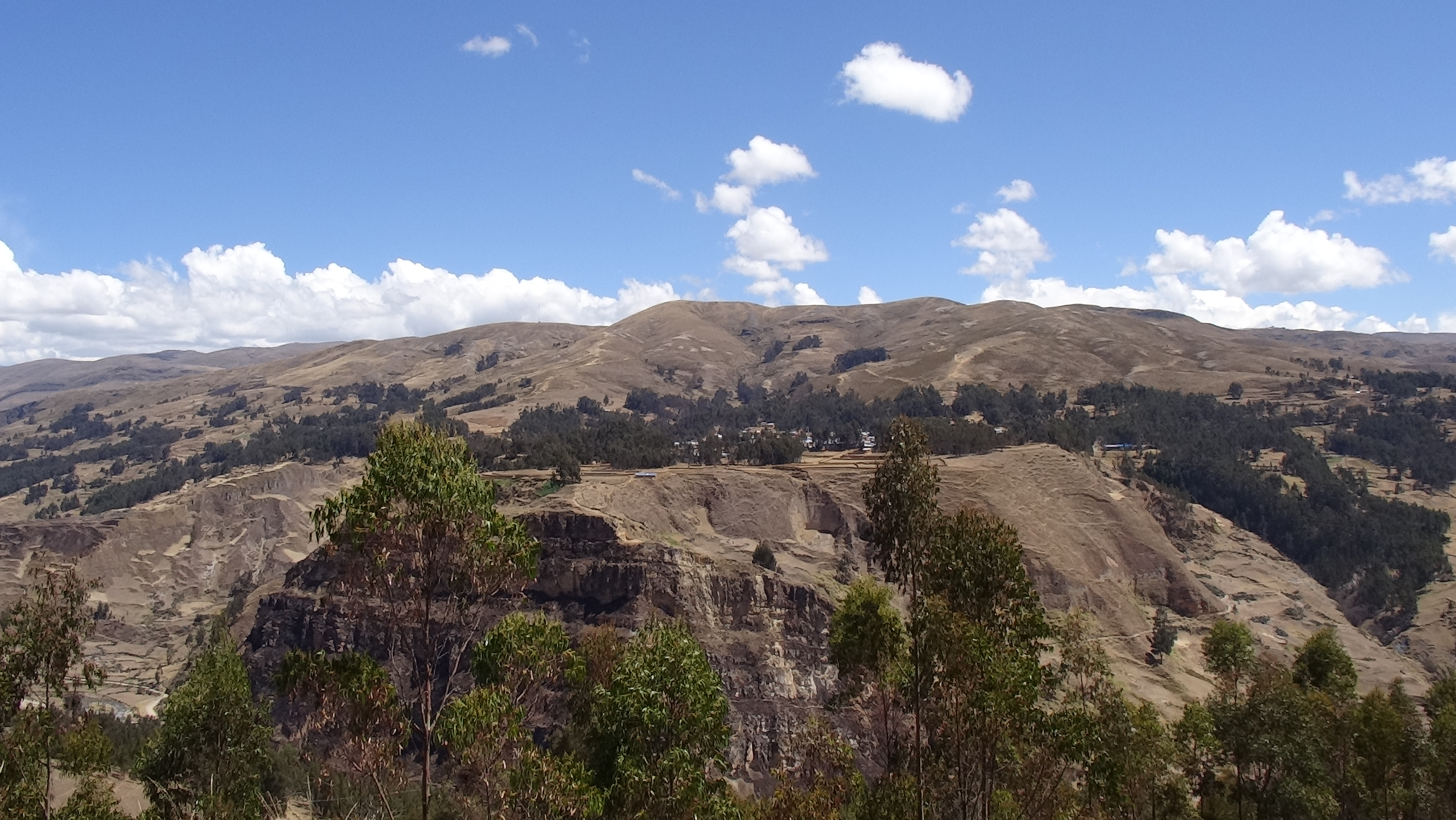 Vista de la parte centro este del distrito de Rondos, donde destaca la meseta homónima; obtenida desde la parte alta de la ciudad de Huarin.